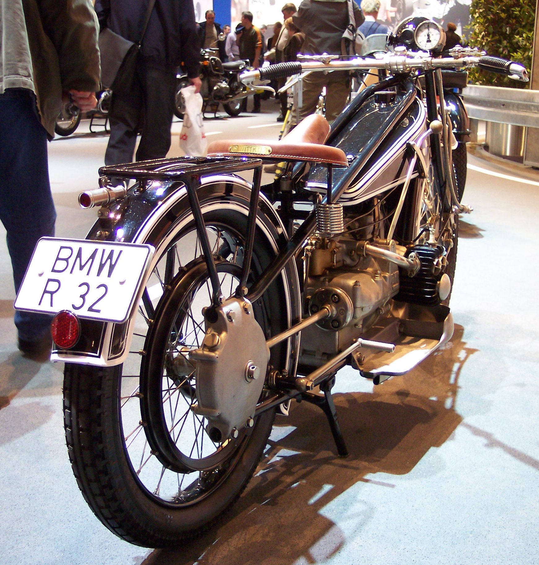 BMW R32